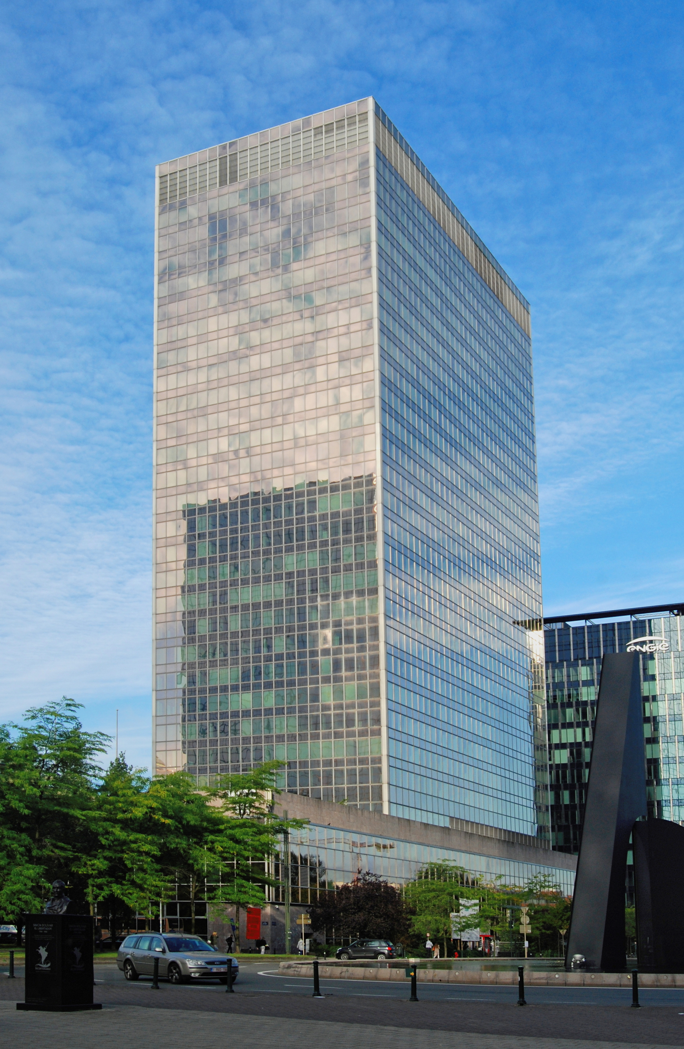 Belgique - Bruxelles - World Trade Center III (architecture fonctionnaliste - 1974 - René Stapels, Groupe Structures, André et Jean Polak)